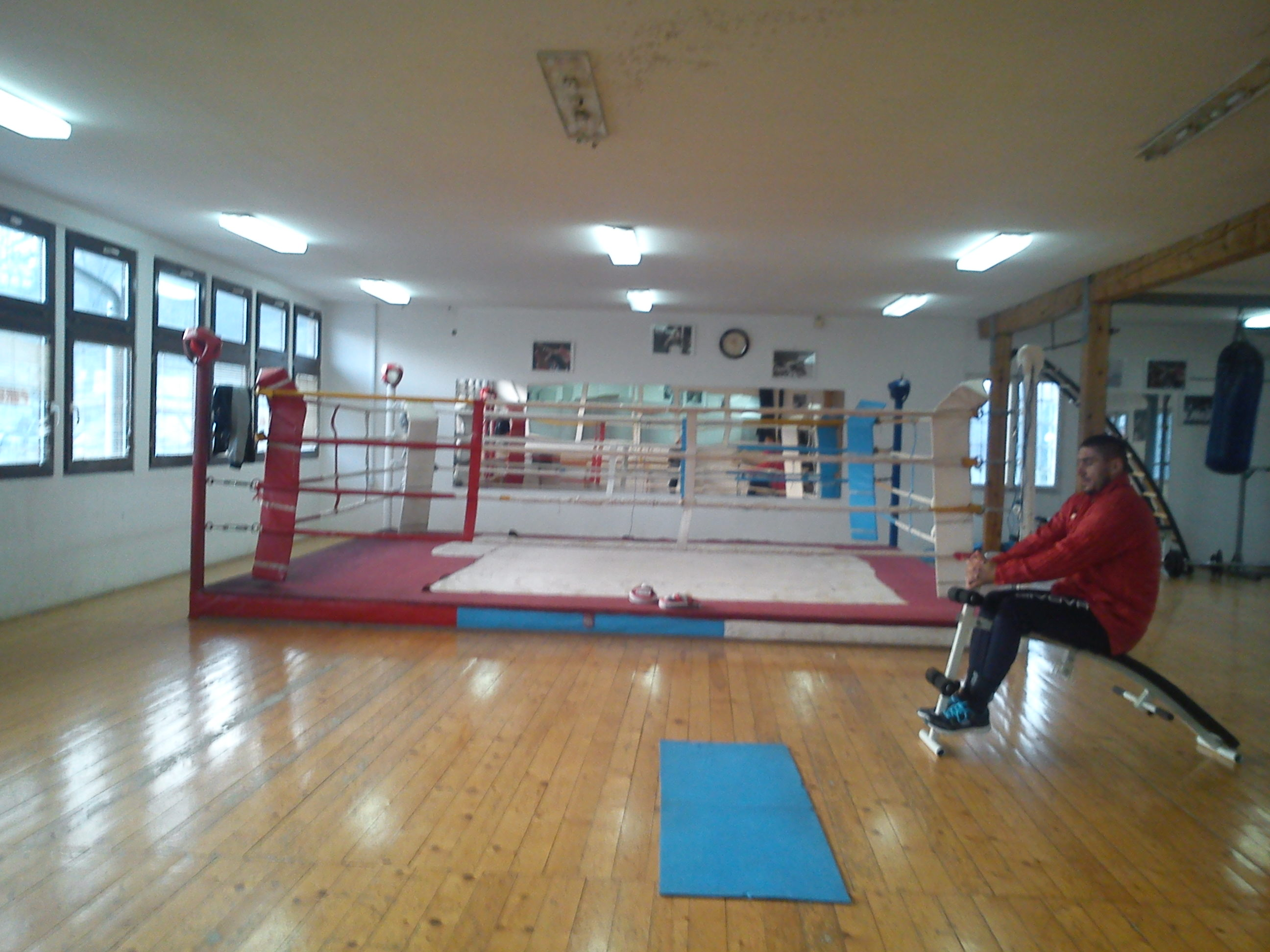 Капитен БК Славија, Дарко Кучук на тренингу